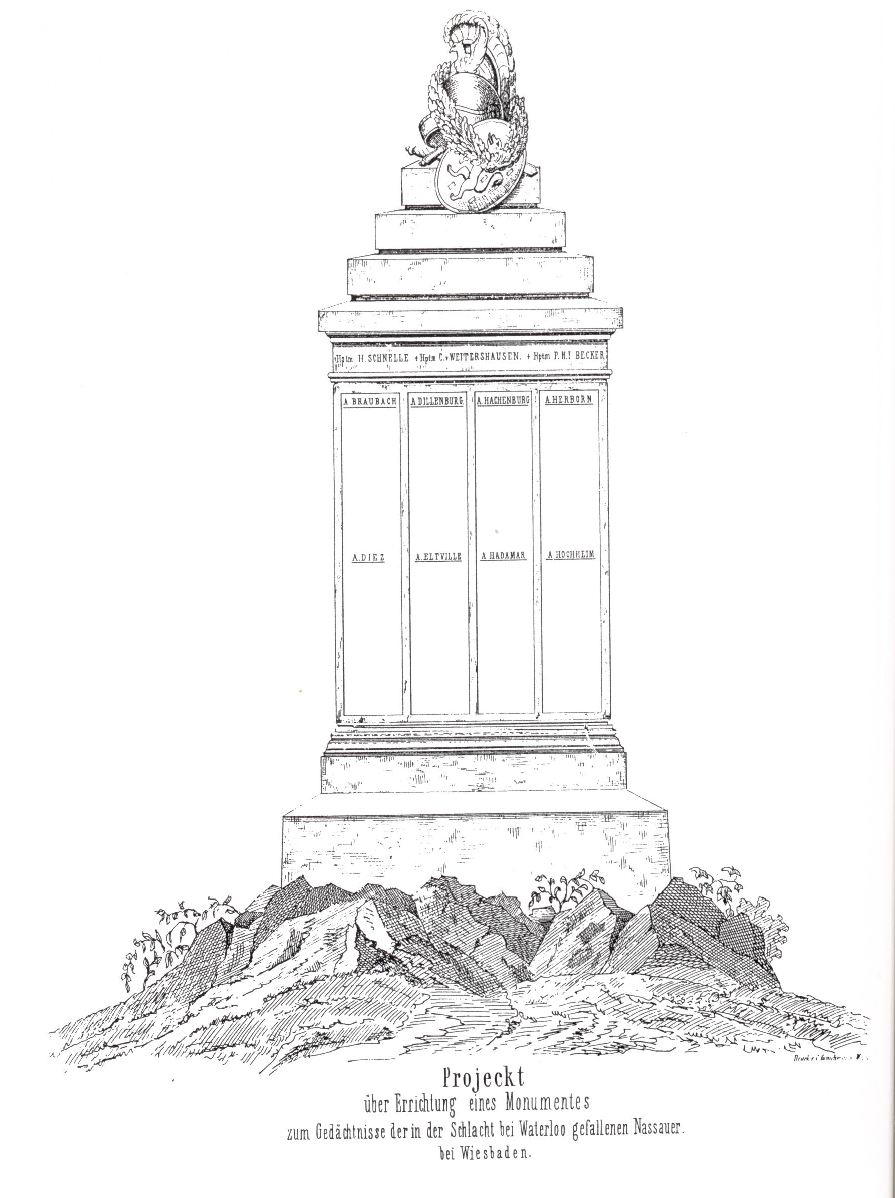 Waterloo-Denkmal in Wiesbaden: Früher Entwurd aus dem Jahr 1865